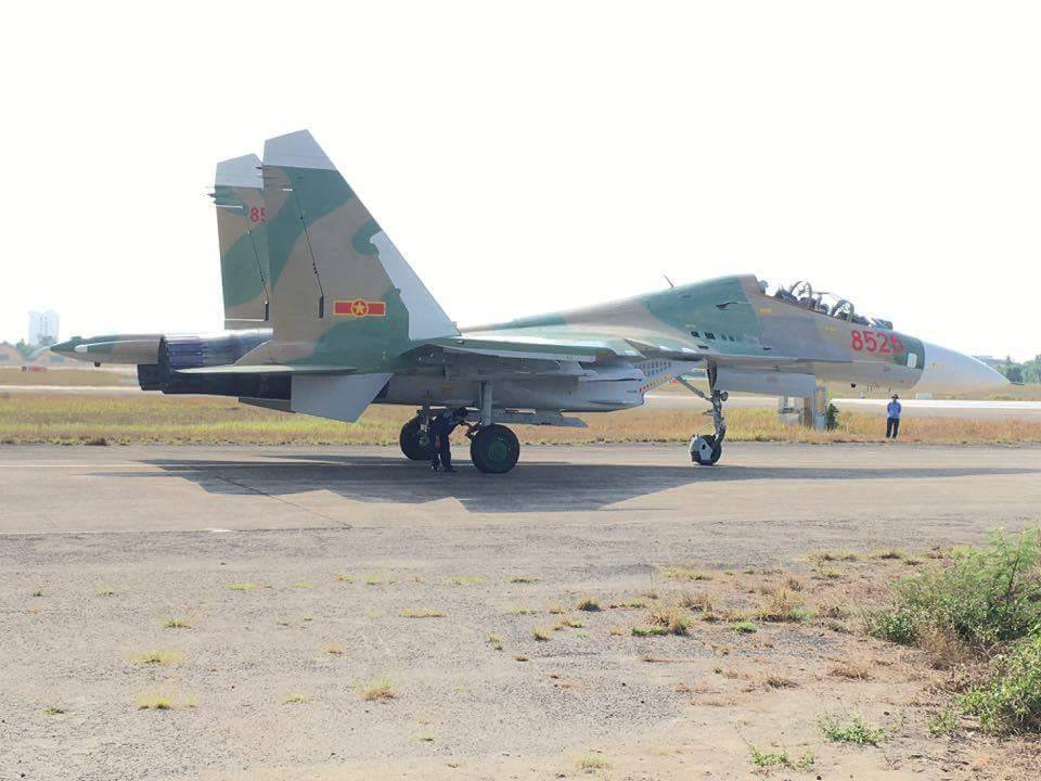 Tiêm kích Su-27UBK